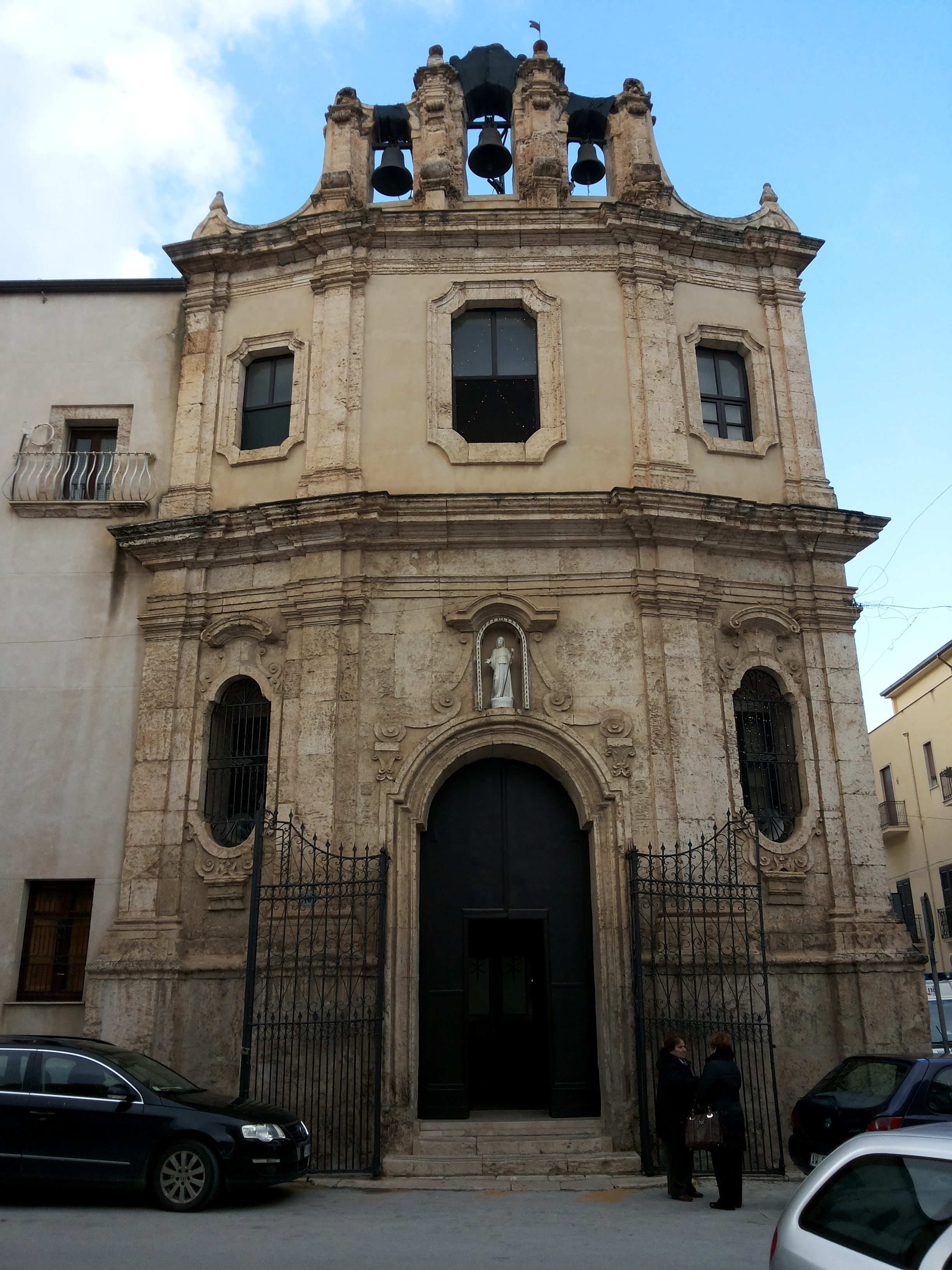 Facciata della chiesa di San Francesco di Paola (Alcamo)